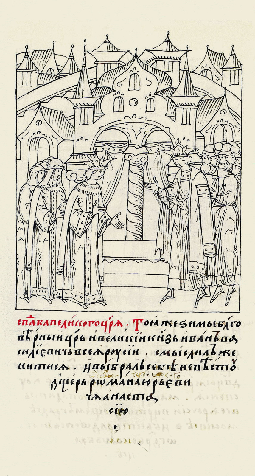 Свадьба Ивана Грозного с Анастасией Романовой. Царственная книга. Свадьба великого царя. В ту же зиму благоверный царь и великий князь Иван Васильевич всея Руси решил жениться и вы- брал себе в невесты дочь своего окольни- чего Романа Юрьеви- ча Анастасию.